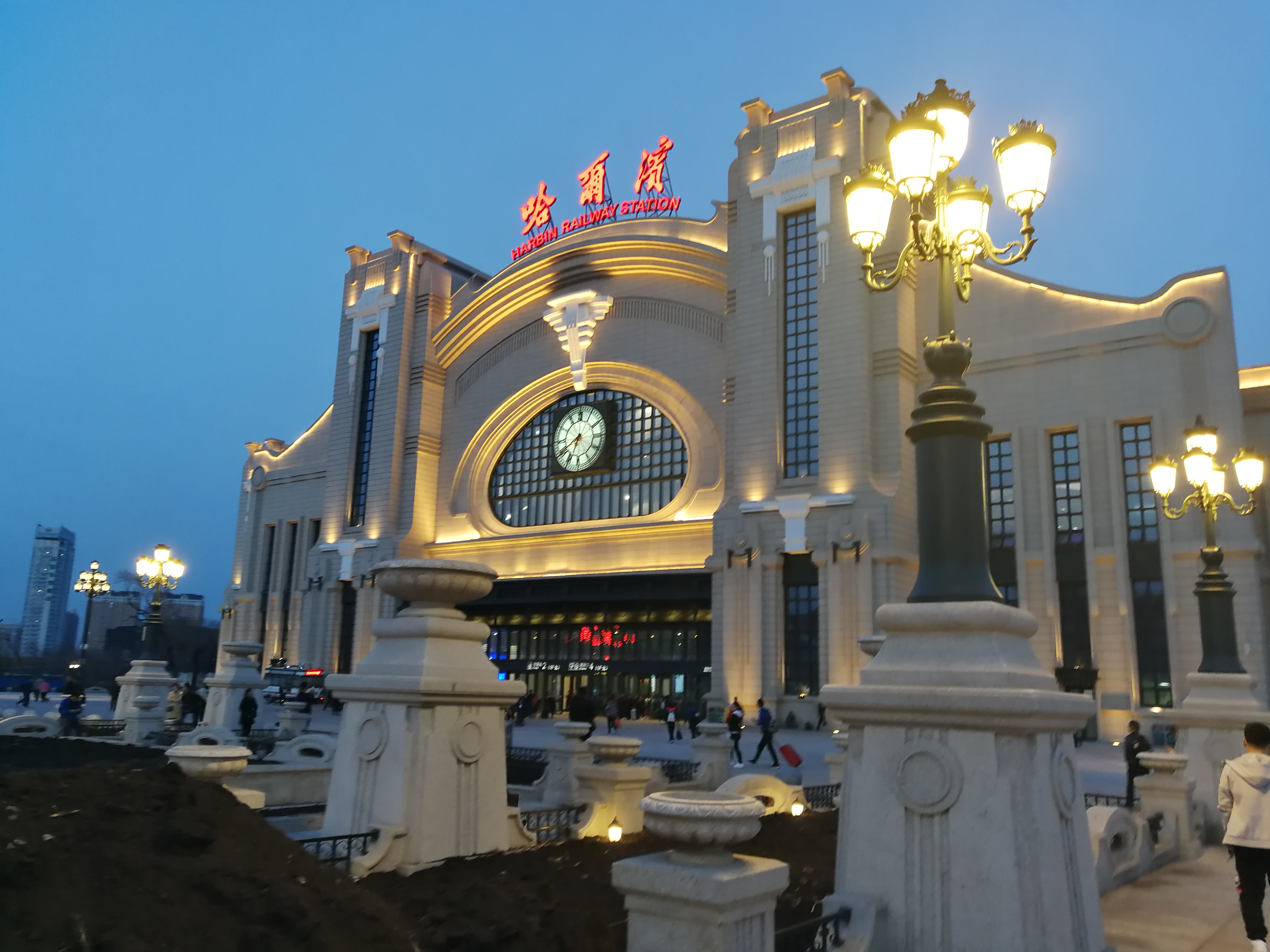 中文（中国大陆）: 已重新建成的哈尔滨火车站北侧,拍摄时南侧尚未建成